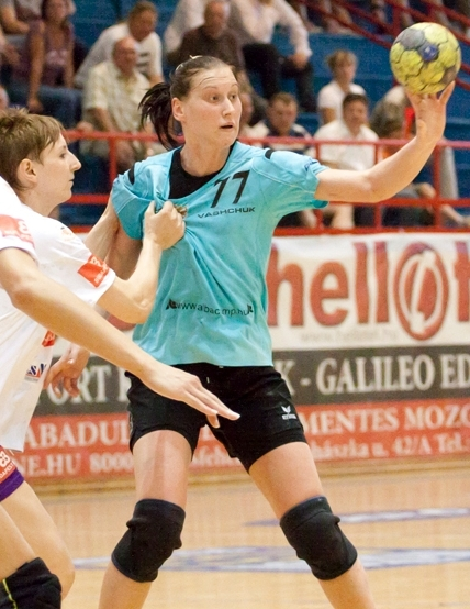 Olga Vashchuk